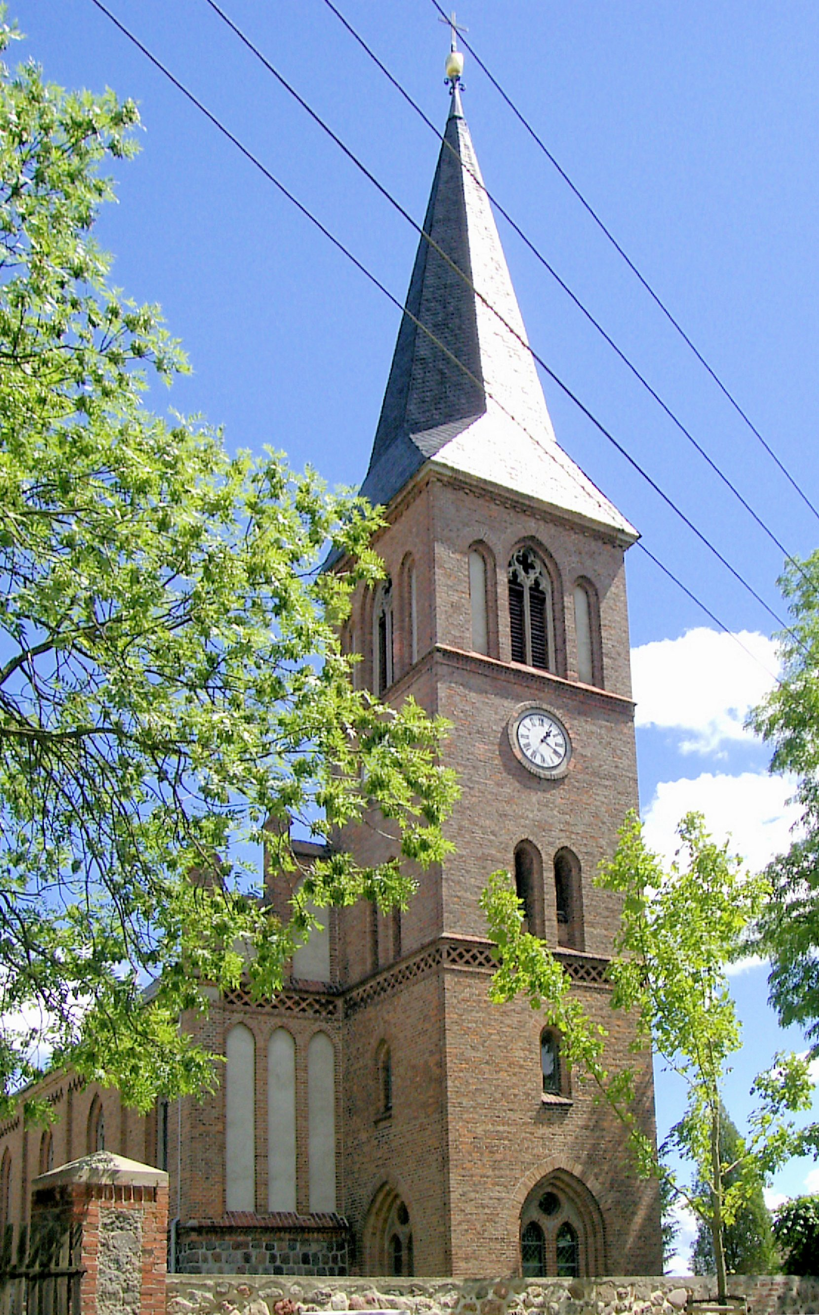 Einschiffige Backsteinkirche in Berkholz